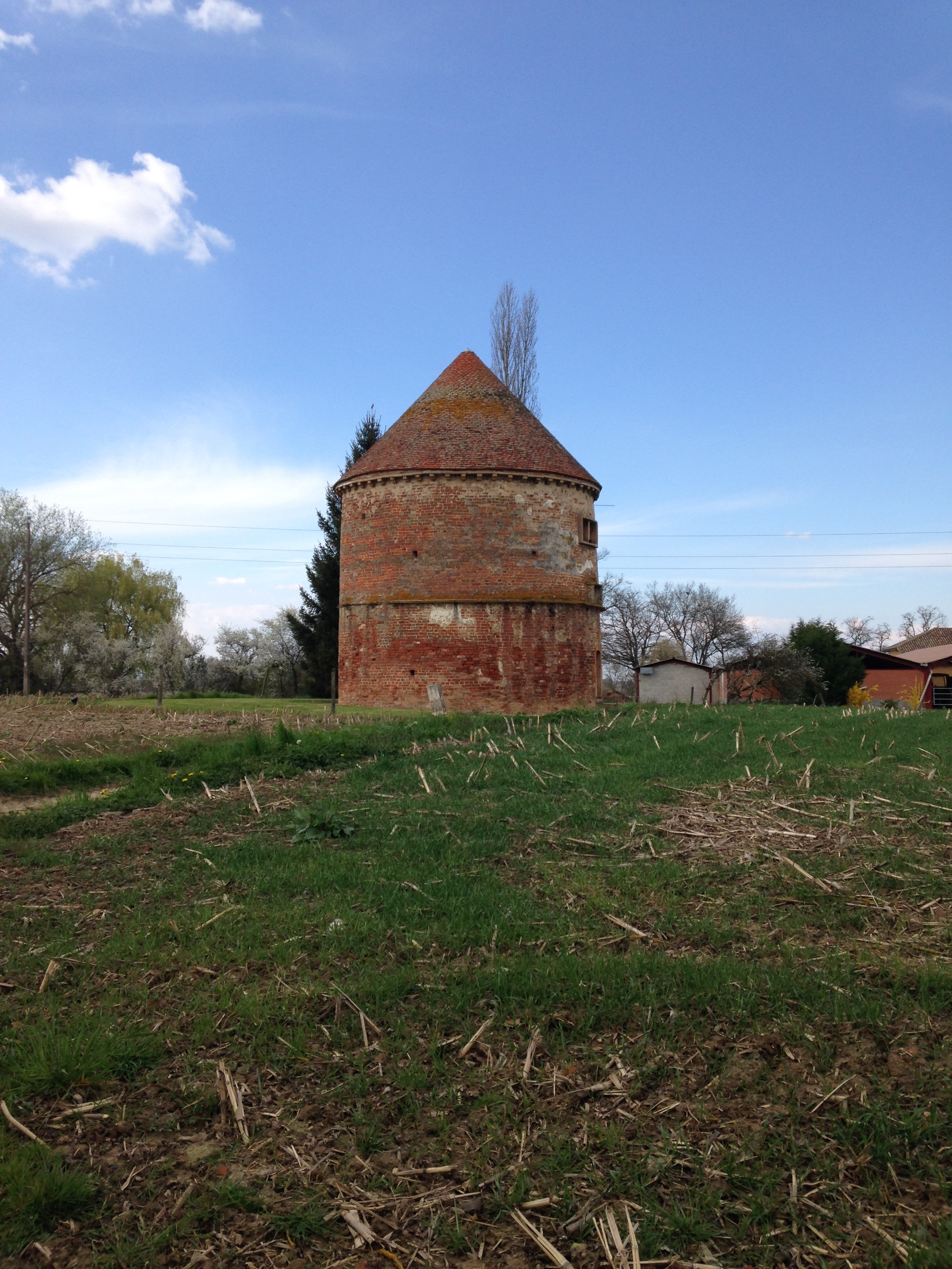 Pigeonnier du village de Perrex